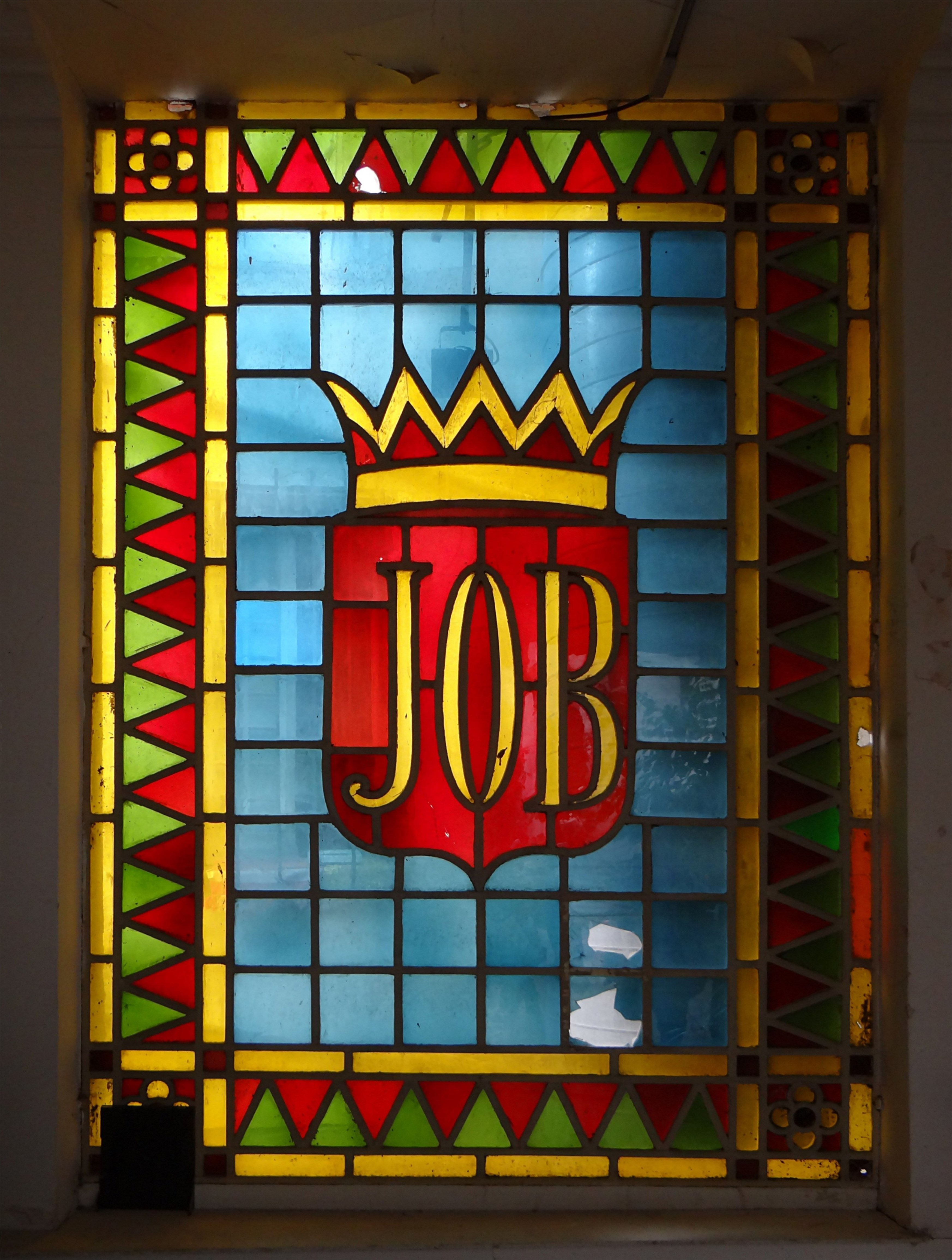 Vitrail JOB - Hôtel Pams, Perpignan, Pyrénées-Orientales, France. This building is en partie classé, en partie inscrit au titre des Monuments Historiques.